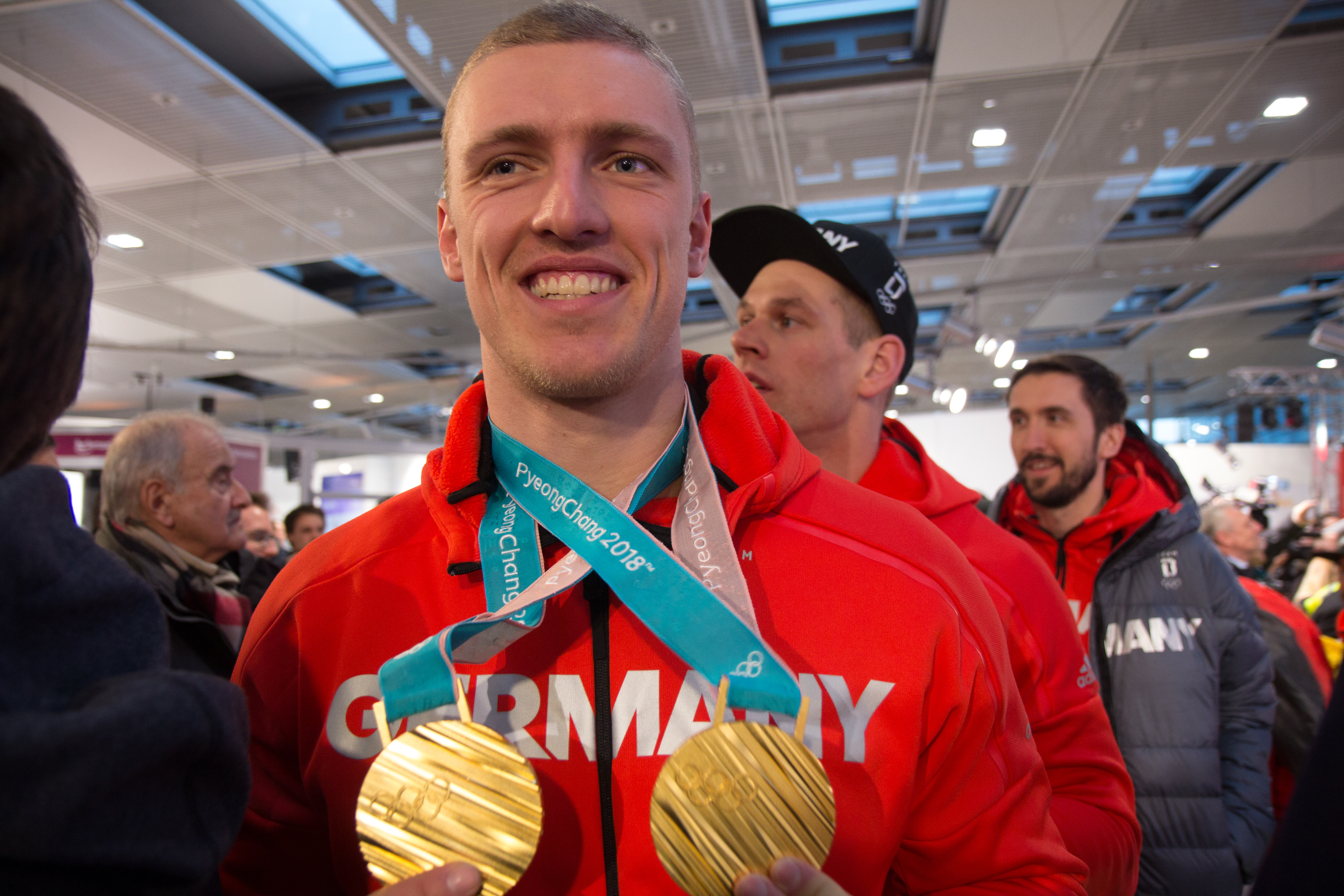 Ankunft der deutschen Olympiamannschaft am 26. Februar 2018 mit Flug LH713 auf dem Frankfurter Flughafen.